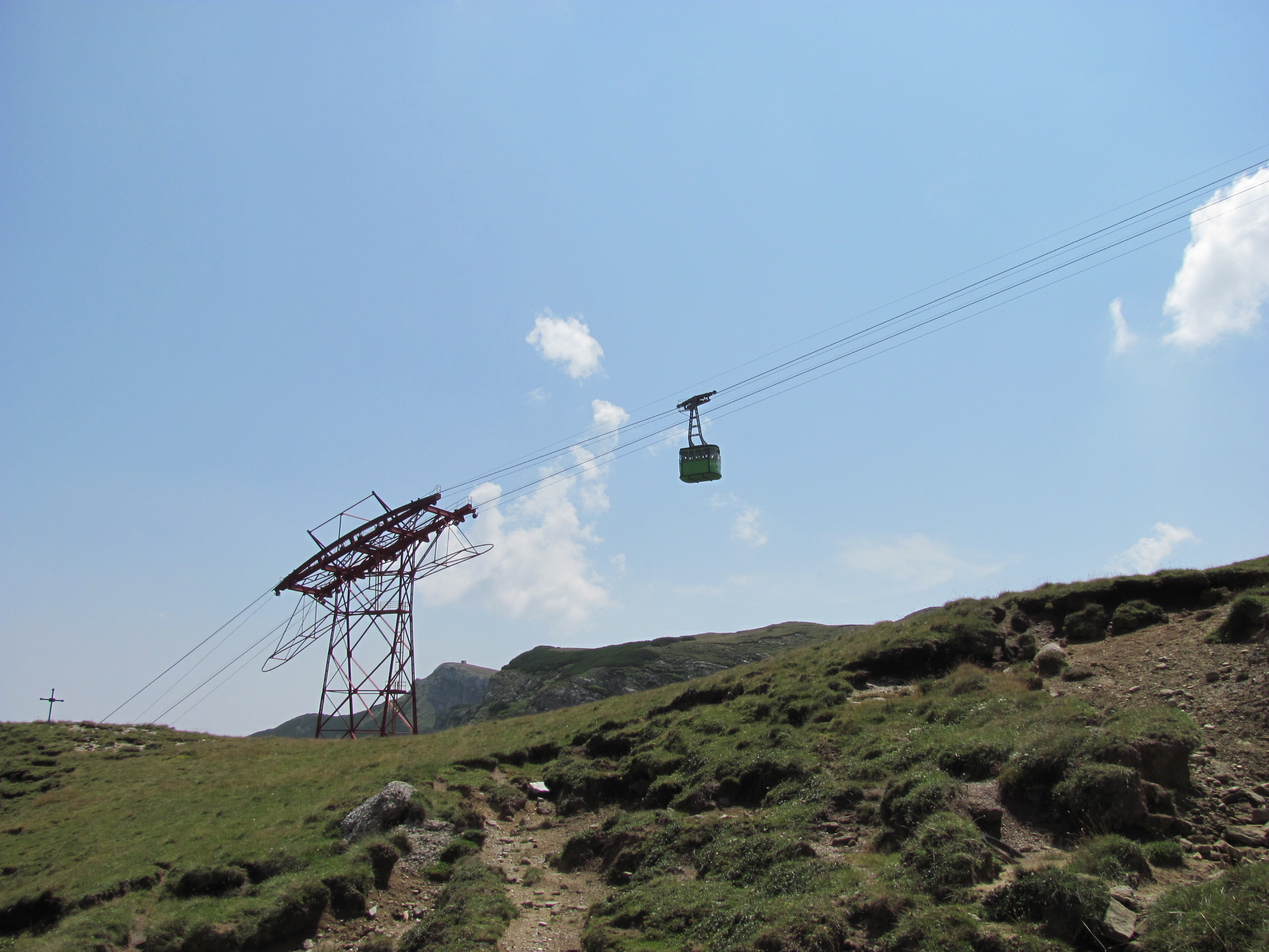 Vedere telecabina la stalpul 4 (stalpul periculos)-15 August 2010